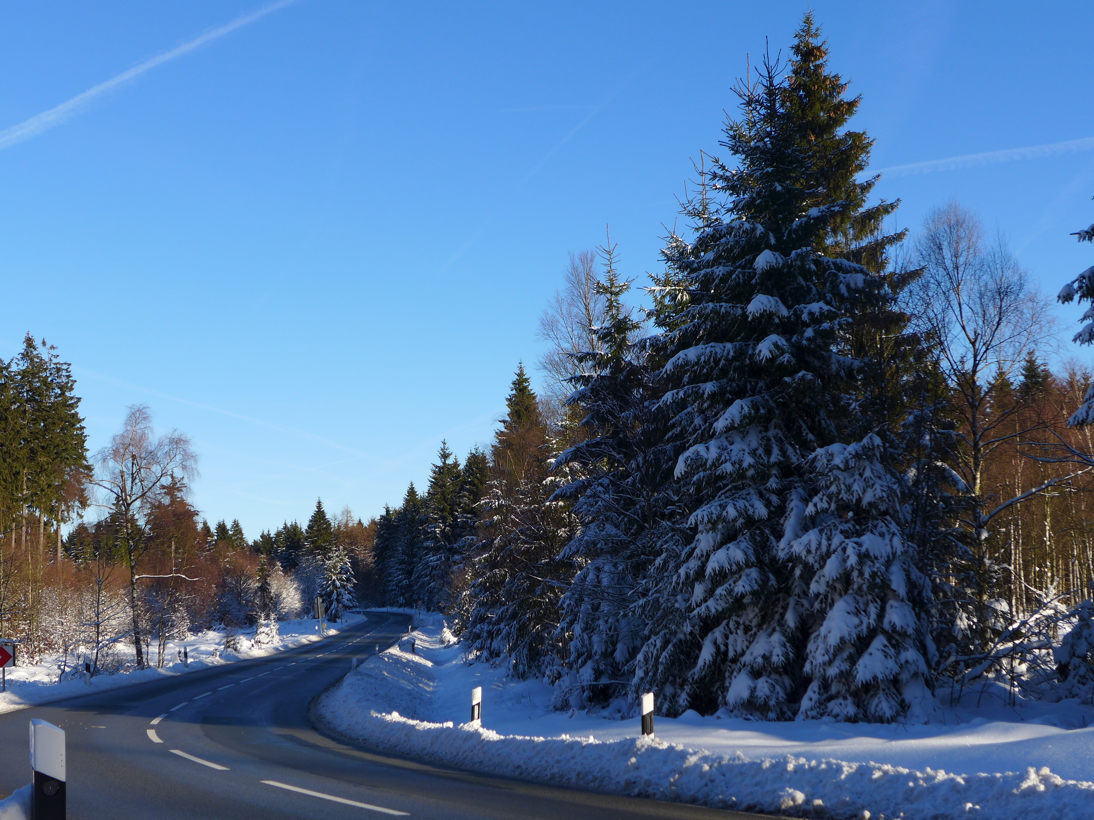 Blick von der scharfen Kurve am Dasseler Mittelberg in östliche Richtung Die gesamte fotografierte Fläche ist - Teil des Landschaftsschutzgebietes Solling - Teil des FFH-Gebietes Moore und Wälder im Hochsolling Hellental - Teil des Vogelschutzgebietes Solling